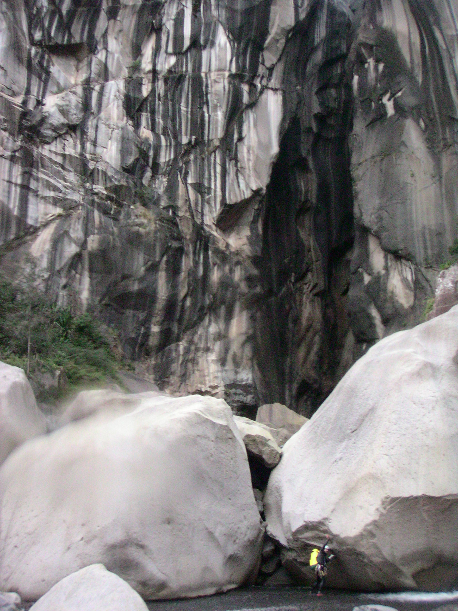 Sortie du canyon des fleurs jaunes: la chapelle Auteur : Jean P Sous gfdl Utilisateur:Ralph juin 2003